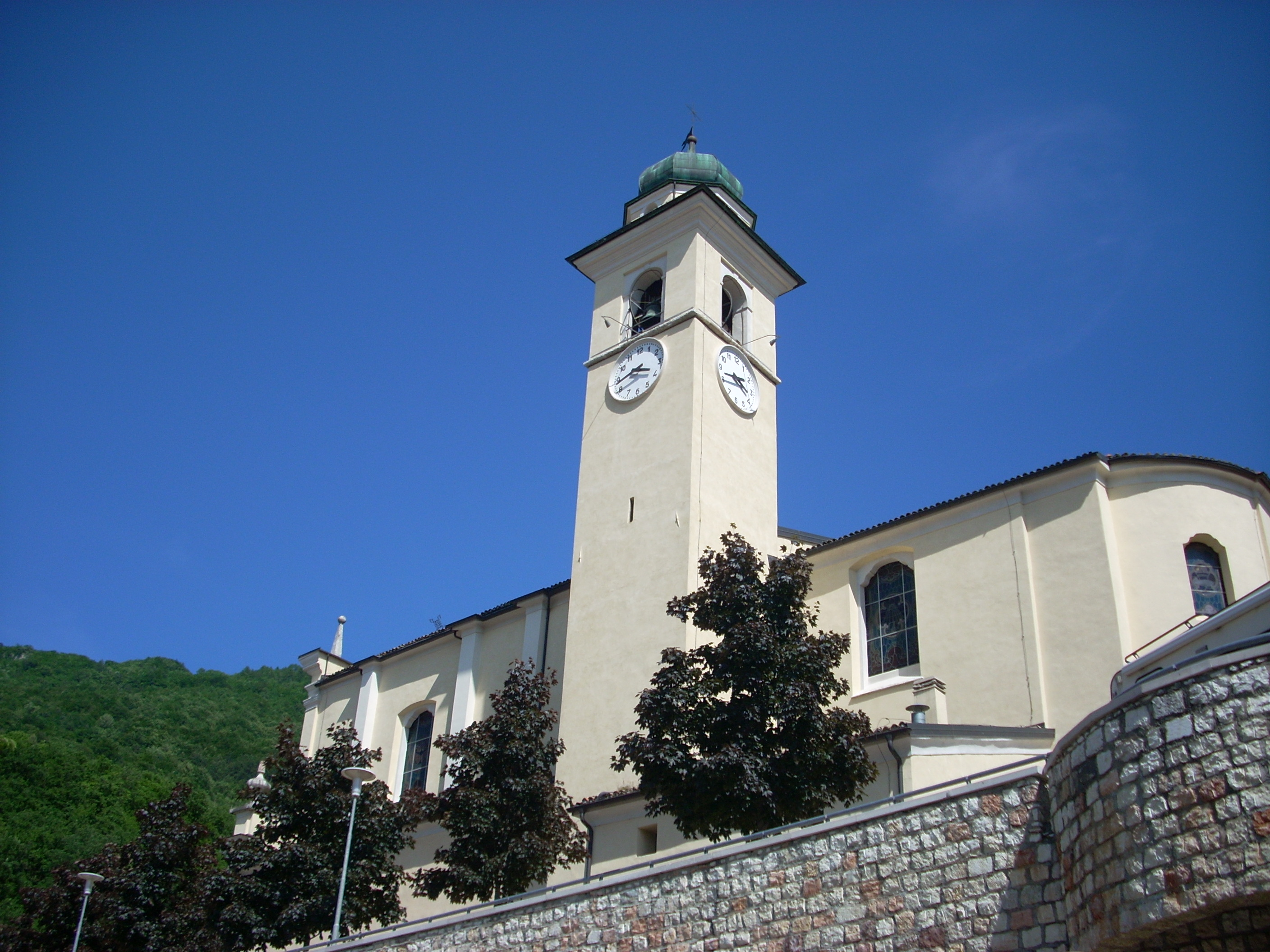 Chiesa parrocchiale di San Martino a Noriglio, frazione del comune italiano di Rovereto.